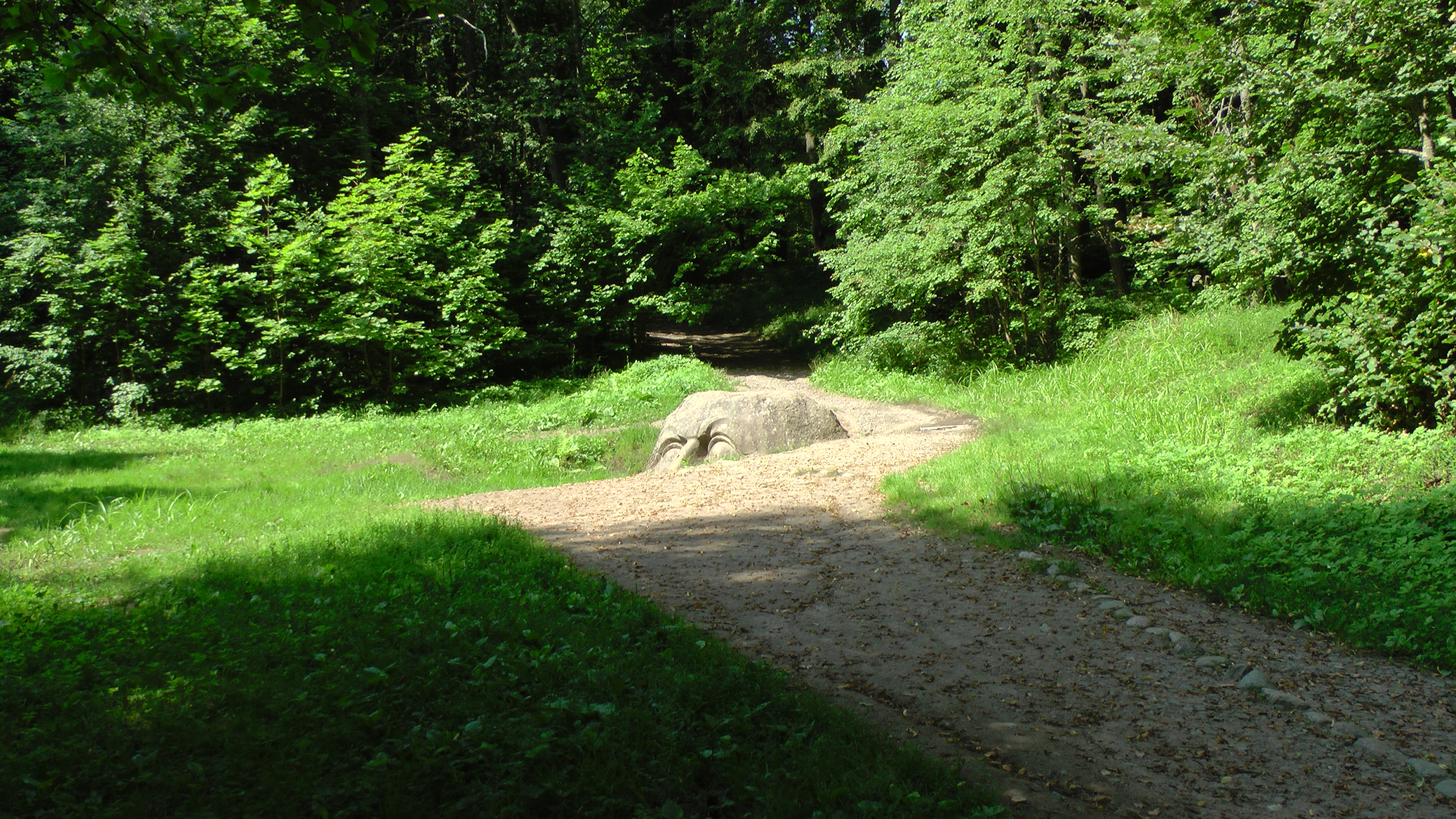 Дворцово-парковый ансамбль Сергиевка